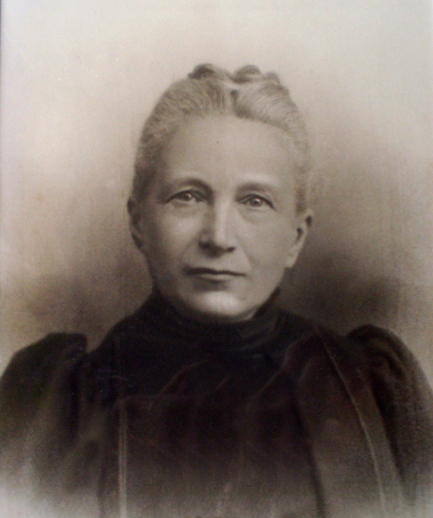 Caroline Constance Albertine van der Hucht-Kerkhoven